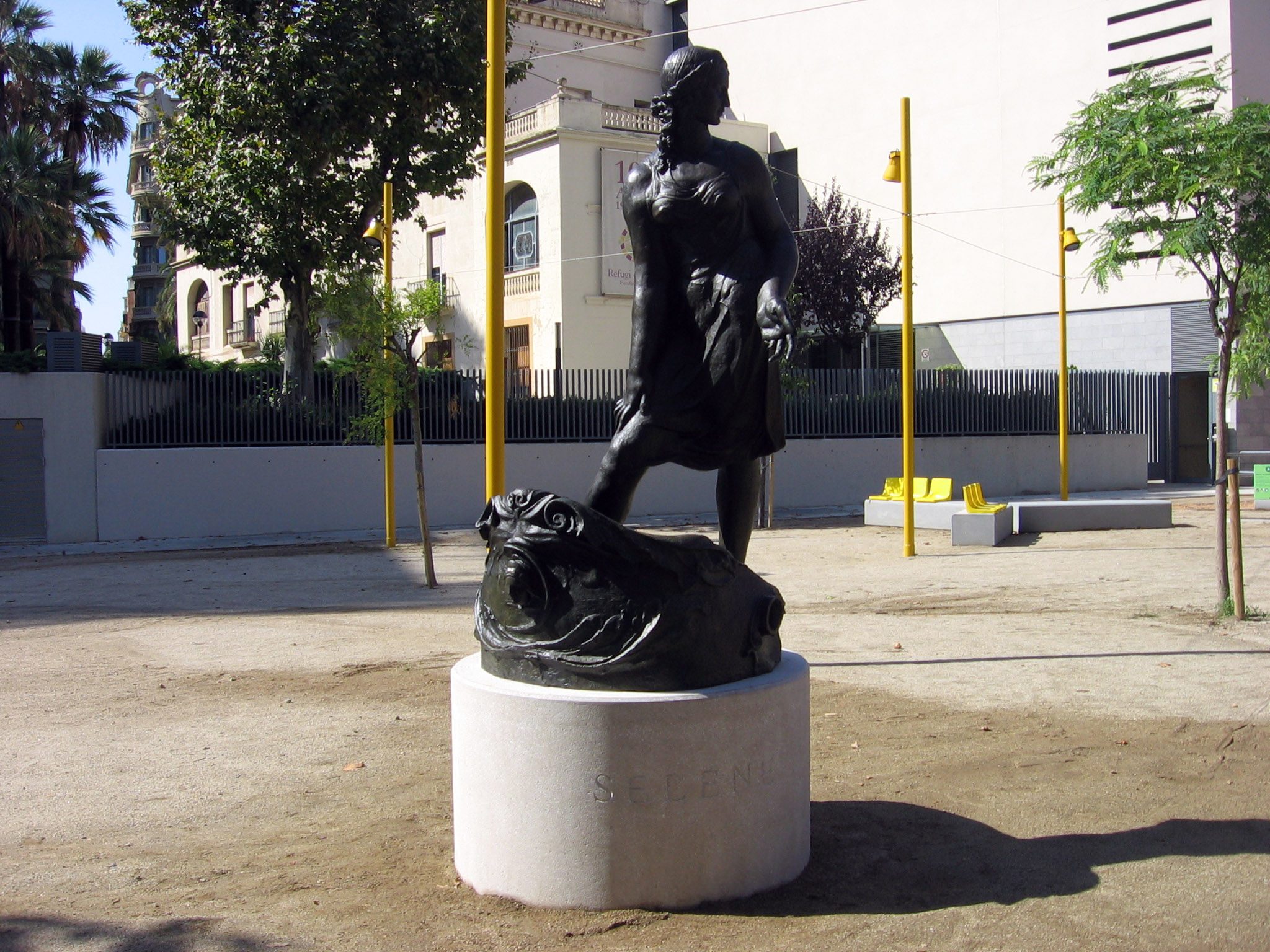 Selene, de Joan Borrell i Nicolau (1929), Avinguda Vallcarca, Barcelona.